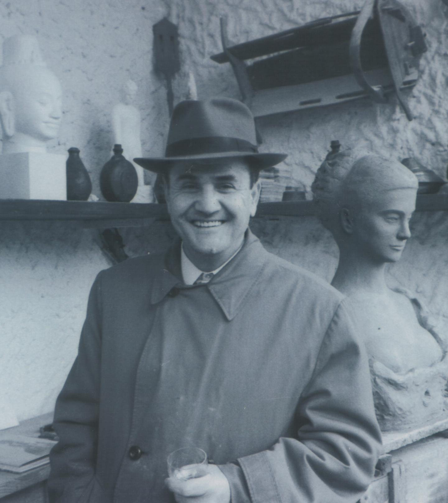 Dušan Petrović Šane, narodni heroj i društveno-politički radnik.foto:Stevan Kragujević (po odobrenju kćerke Tanje Kragujević)